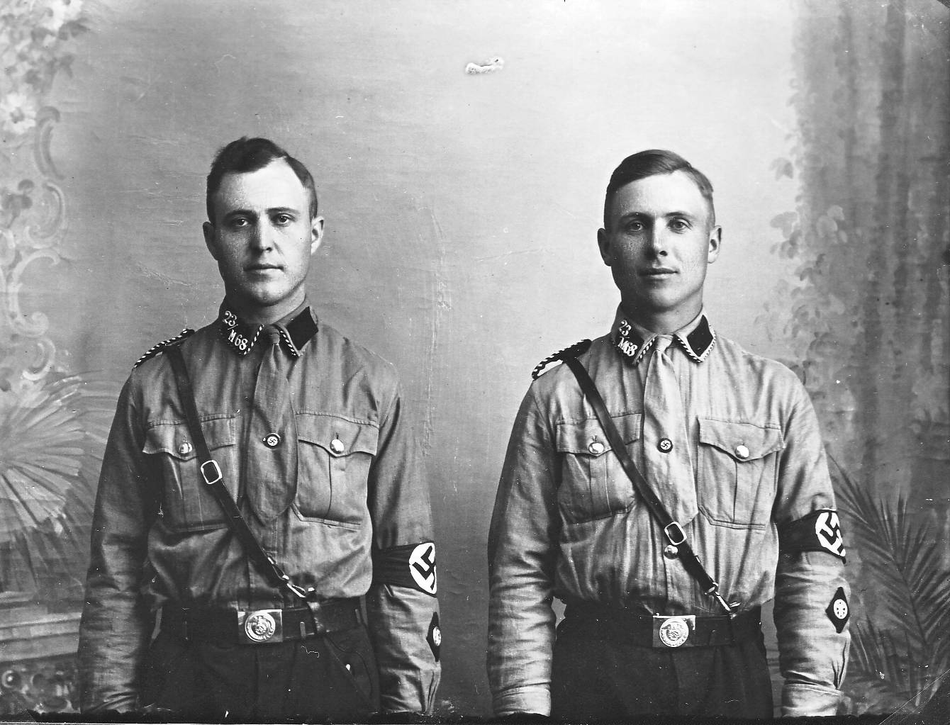 2 NSKK-Männer des 23. Sturmes der 68. NSKK-Motorstandarte.